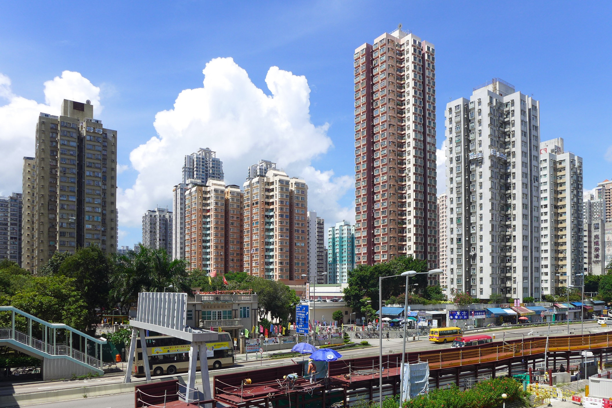 Kai Tei Residences